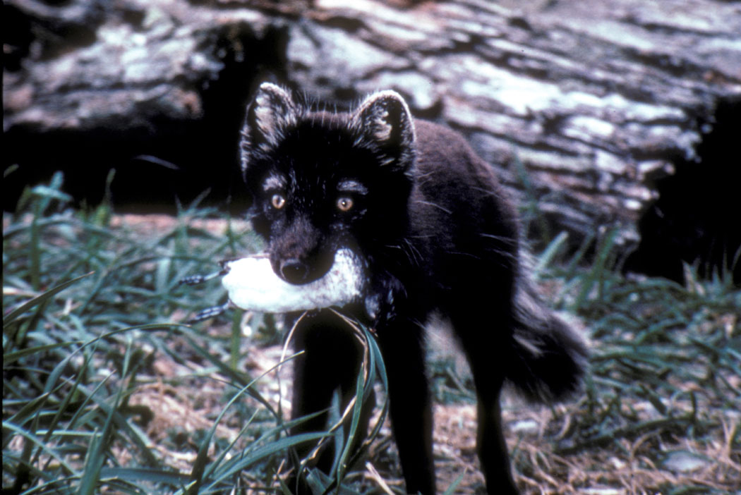 Renard arctique sur l'île de St. Mattews ayant capturé un Starique minuscule.